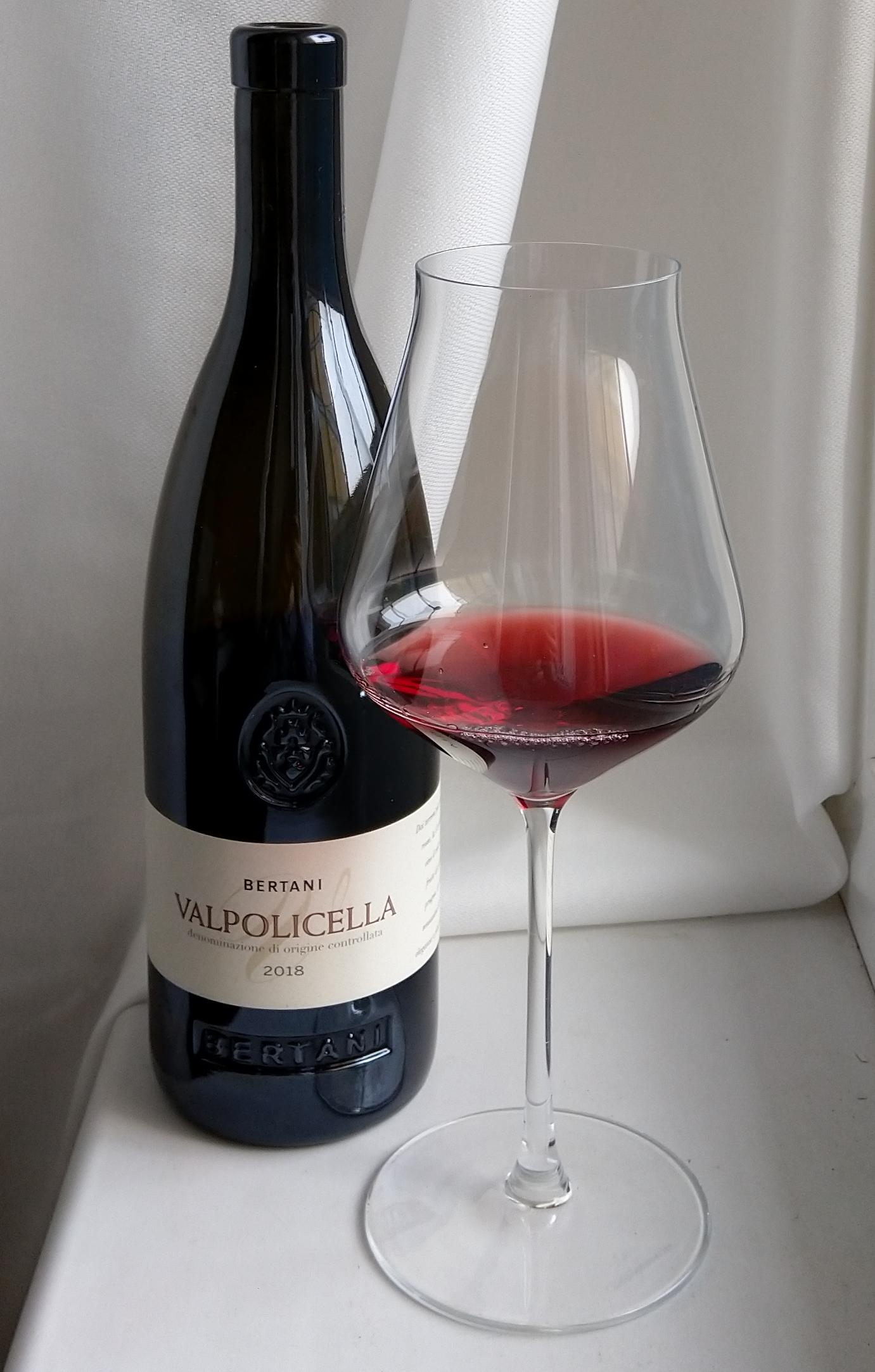 Valpolicella bertani